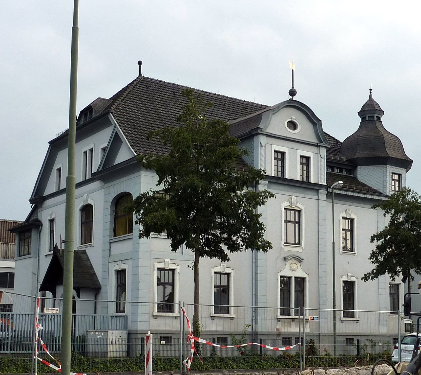 Barbarossastraße 50: Direktorenvilla; zweieinhalbgeschossiger neubarocker Krüppelwalmdachbau auf bewegtem Grundriss, 1909